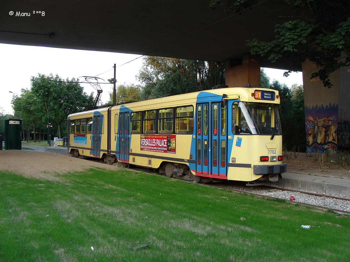 Motrice 7788 à Progrès (un arrêt après son terminus)